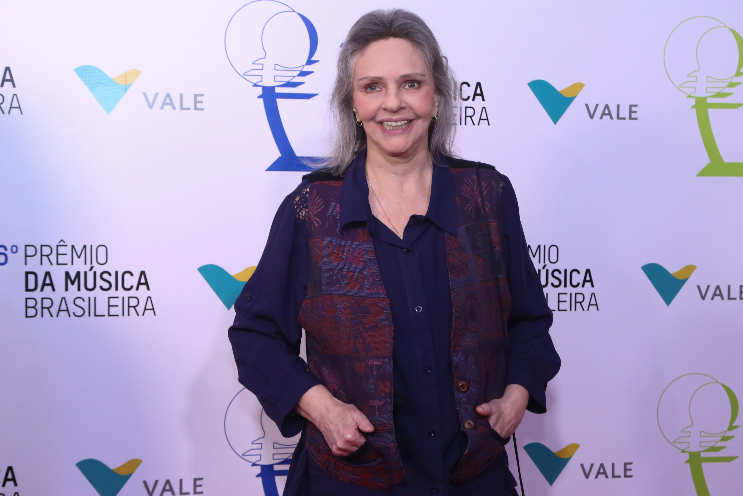 Ângela Rô-Rô - 26° Prêmio da Música Brasileira 2015, no Theatro Municipal, no Centro do Rio de Janeiro/RJ. (10/06/15) Foto: Roberto Filho/Divulgacão